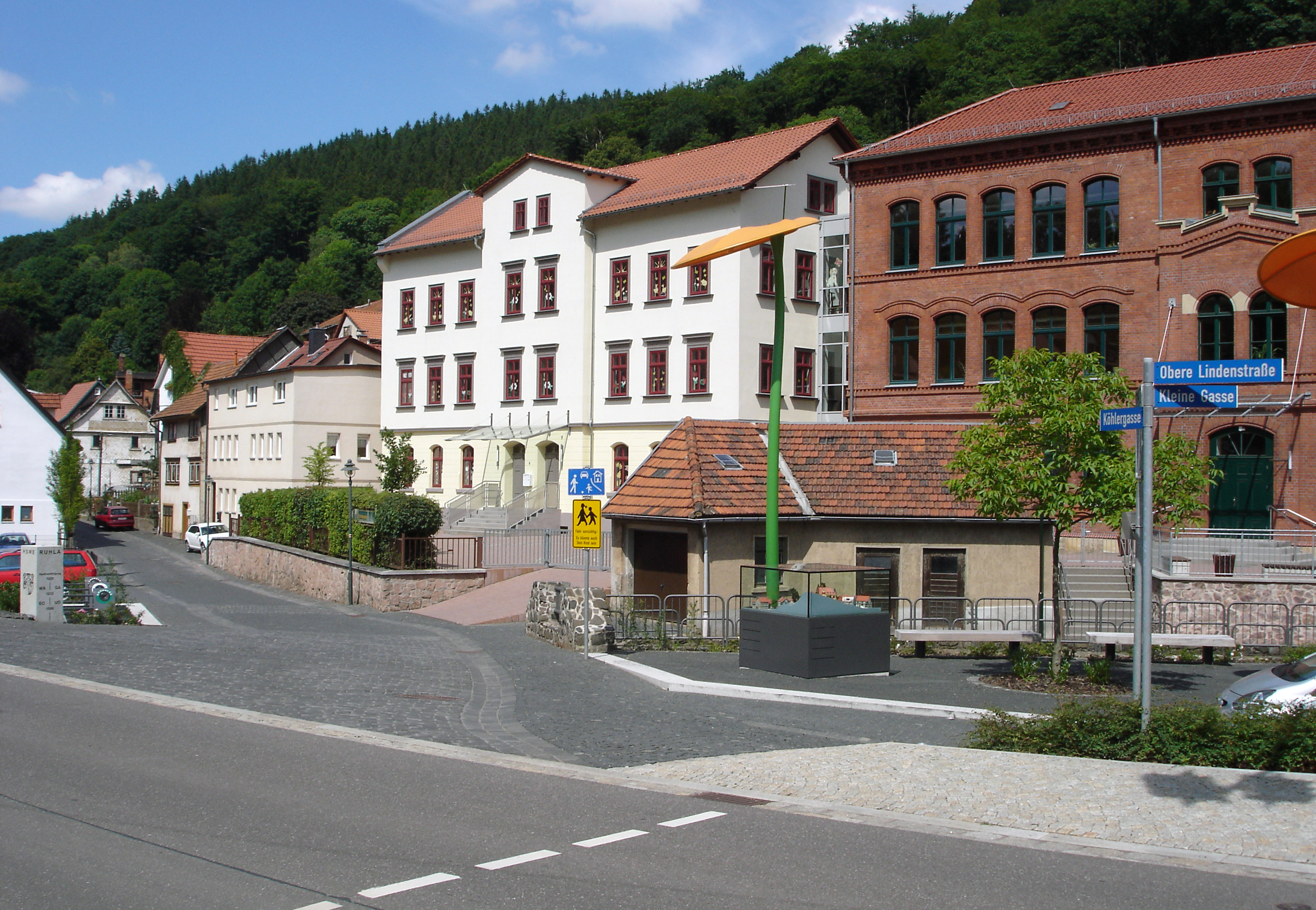 Ruhlaer Breitenbergschule am Eingang der historischen Köhlergasse